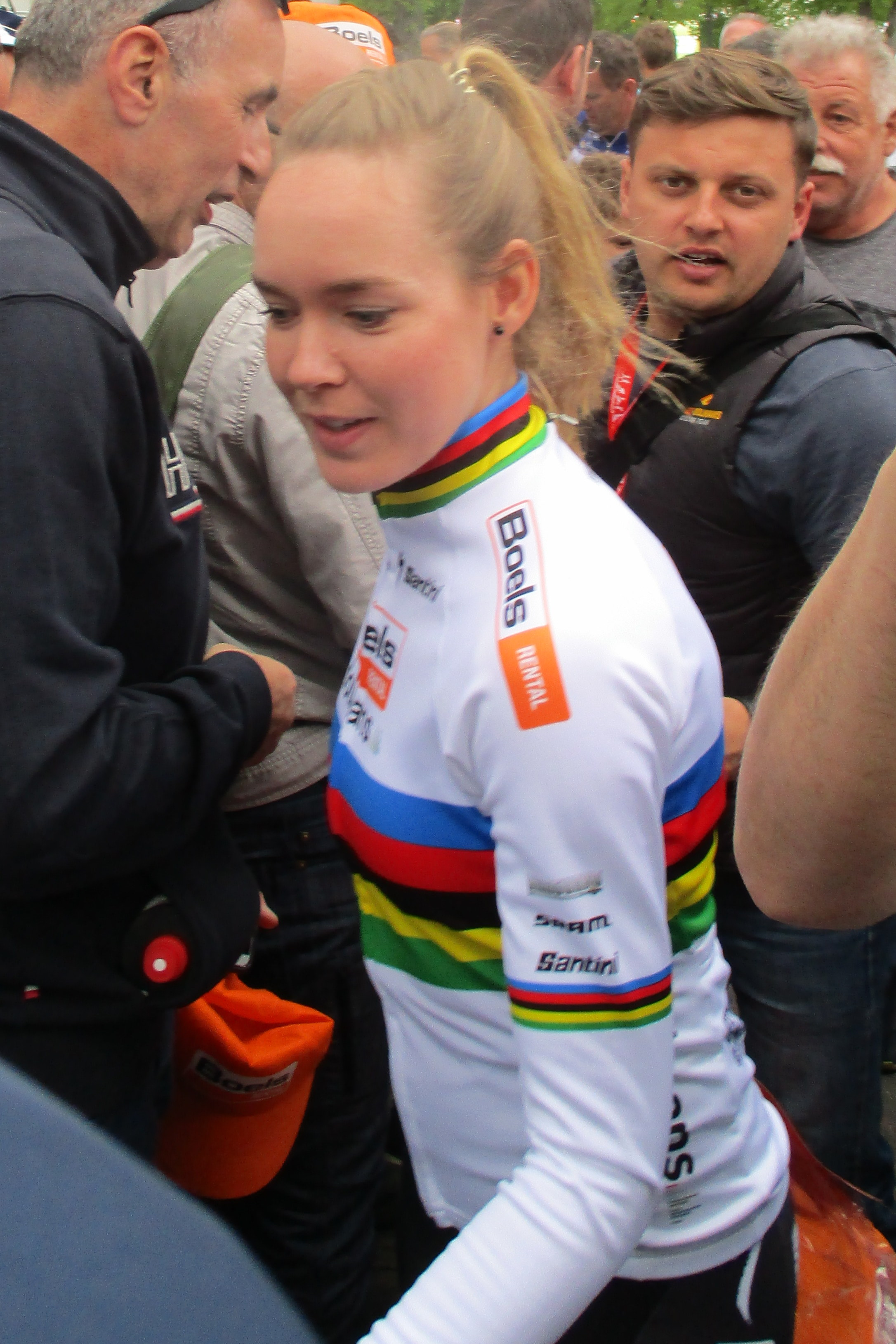 Anna van der Breggen, winnares van de Waalse Pijl 2019